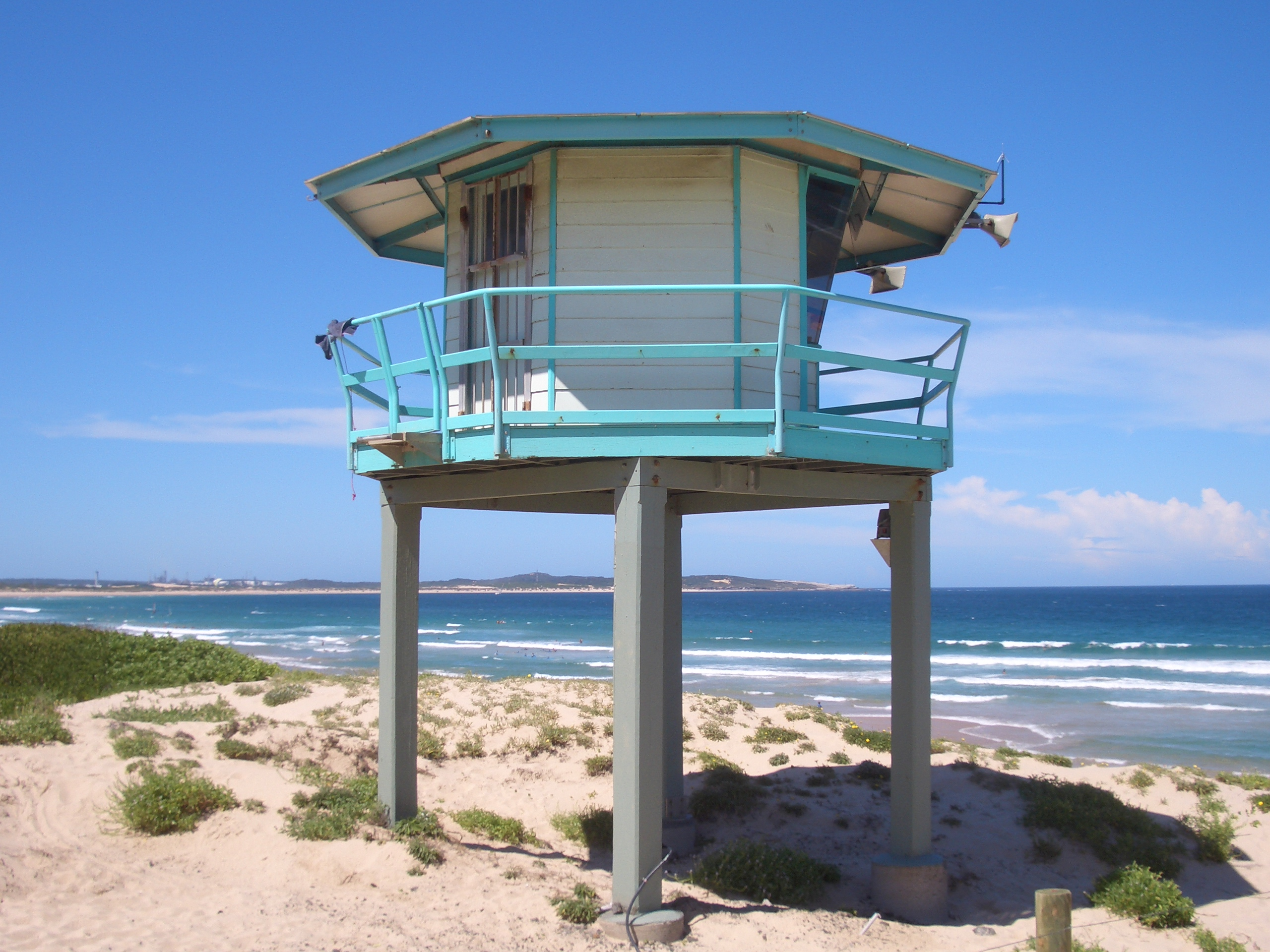 Elouera Beach